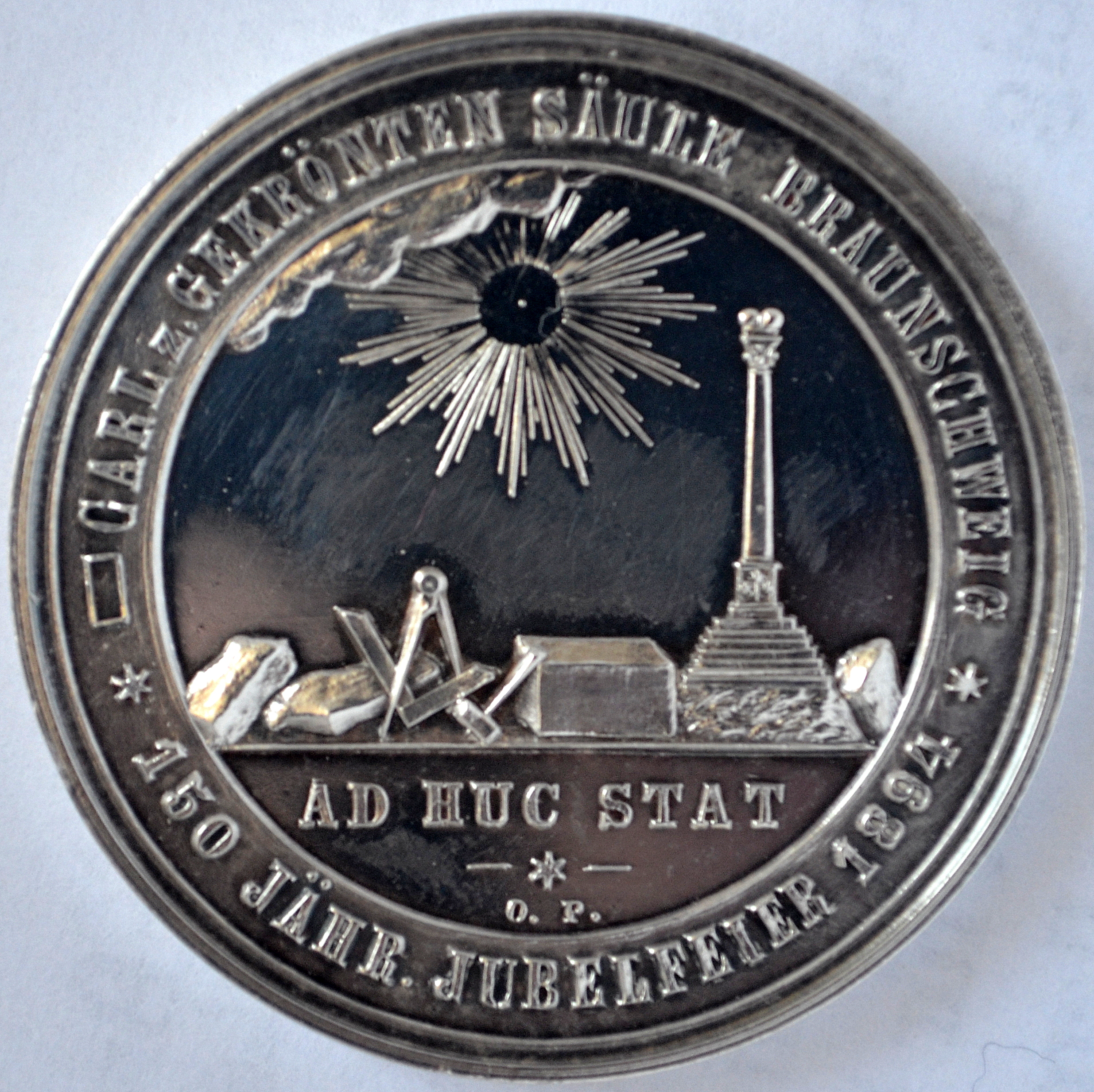 Braunschweig, Carl zur gekrönten Säule: Avers der Gedenkmedaille zur 150-Jahr-Feier der Freimaurerloge 1894.